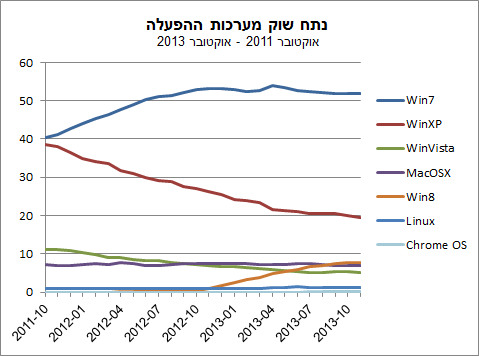 פילוח תפוצת מערכות ההפעלה למחשב, 2011 - 2013